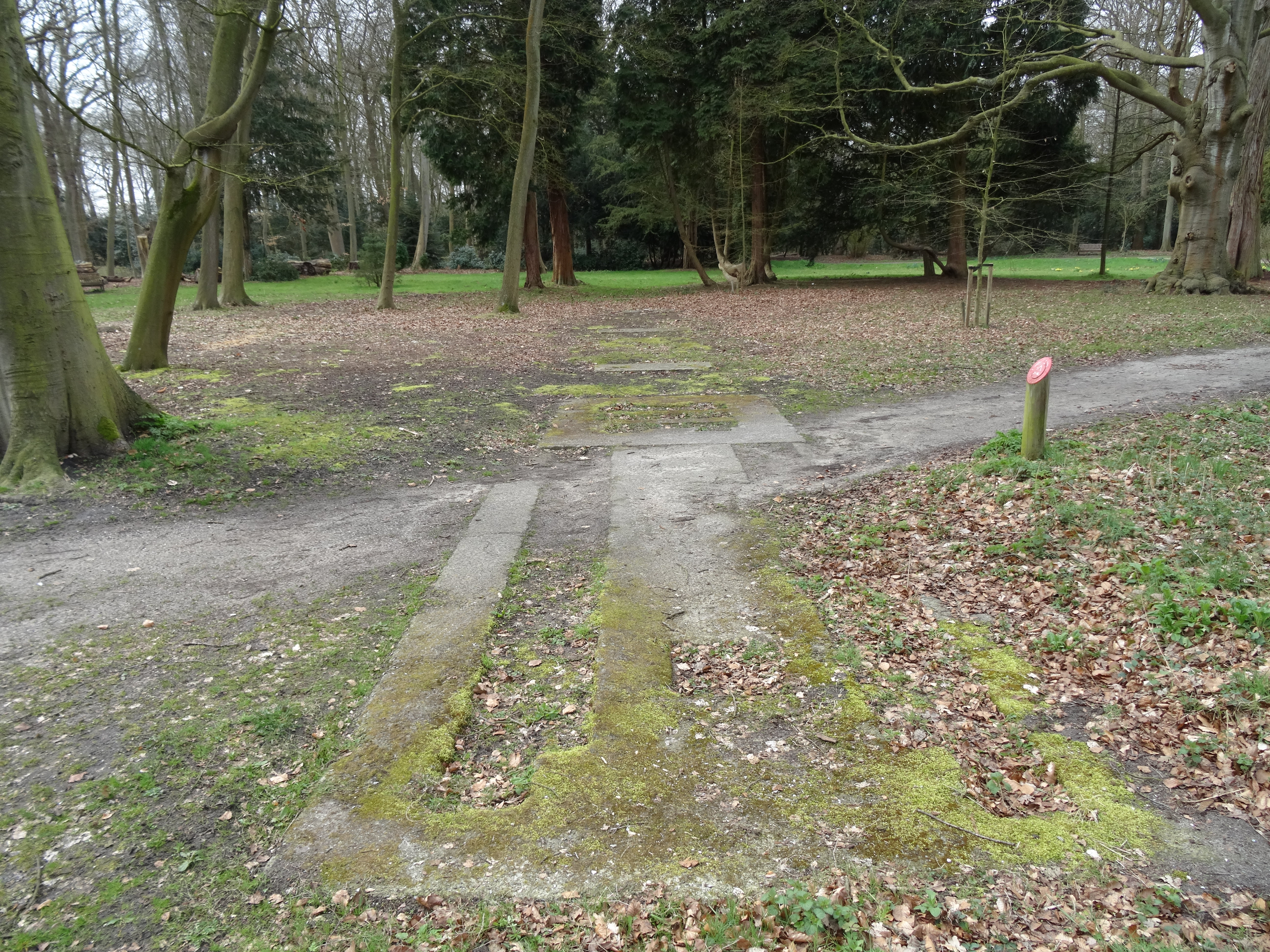 Park bij Huis te Warmond: de resten van een V1 lanceerbaan, die aan het eind van de Tweede Wereldoorlog werd gebouwd, maar nooit is gebruikt.